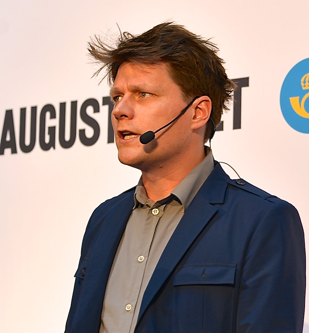 Daniel Sjölin på Augustprisnomineringen 2012